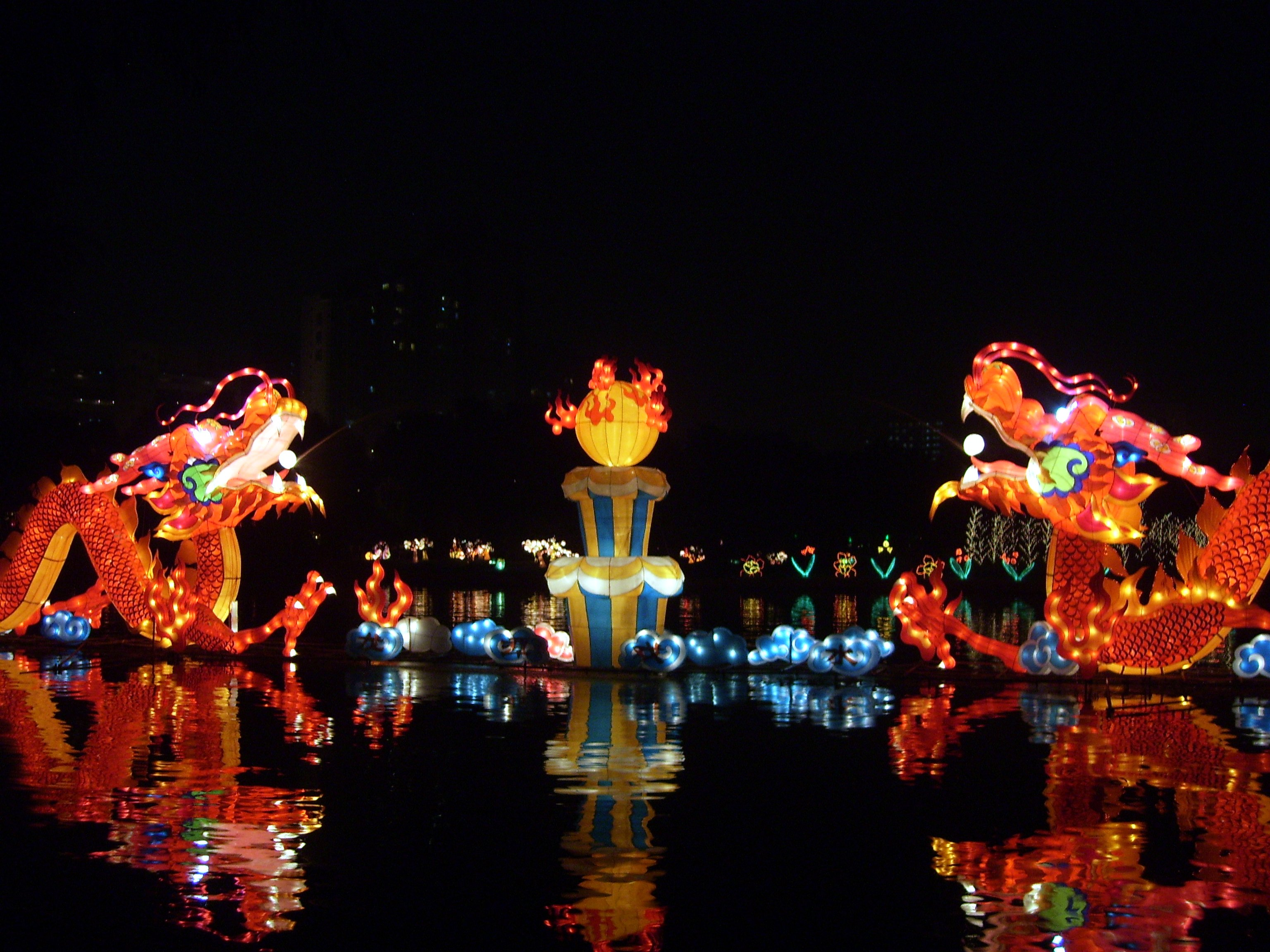 北京龙潭湖中秋节的灯会，二龙戏珠